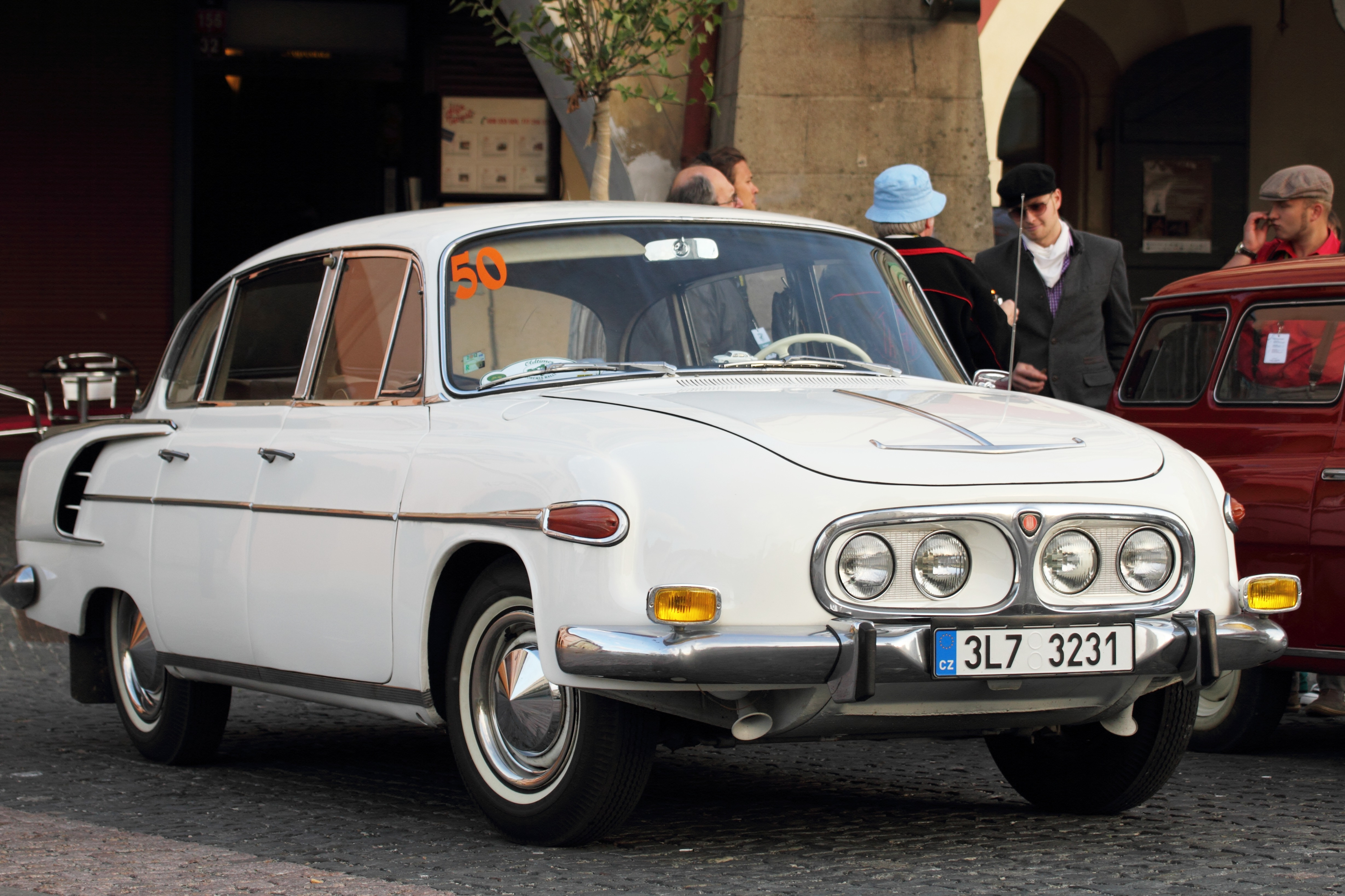 Tatra 2-603 (1967), 2013 Oldtimer Bohemia Rally